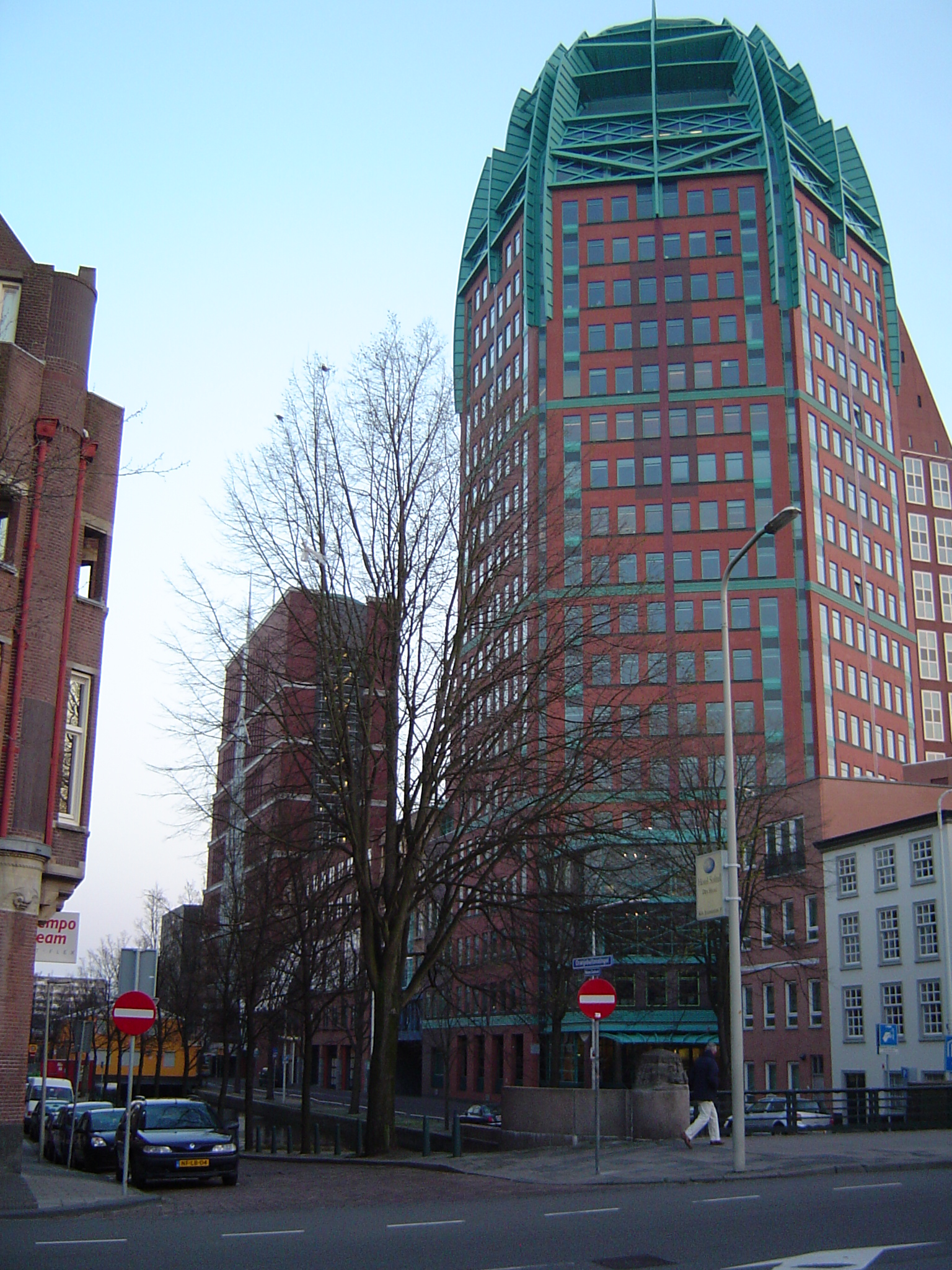 Zurichtoren Den Haag Made by Joris, 2004